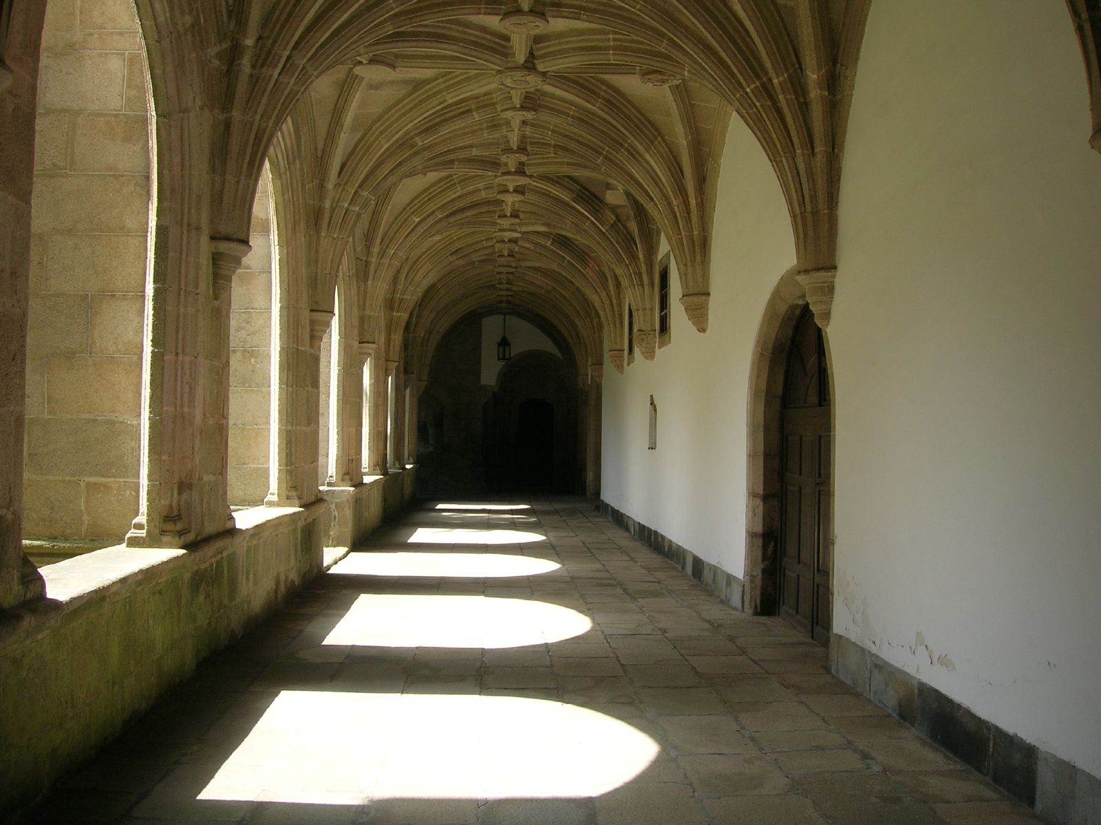 Mosteiro de San Xulián de Samos, Galiza'Mosteiro de San Xulián de Samos'